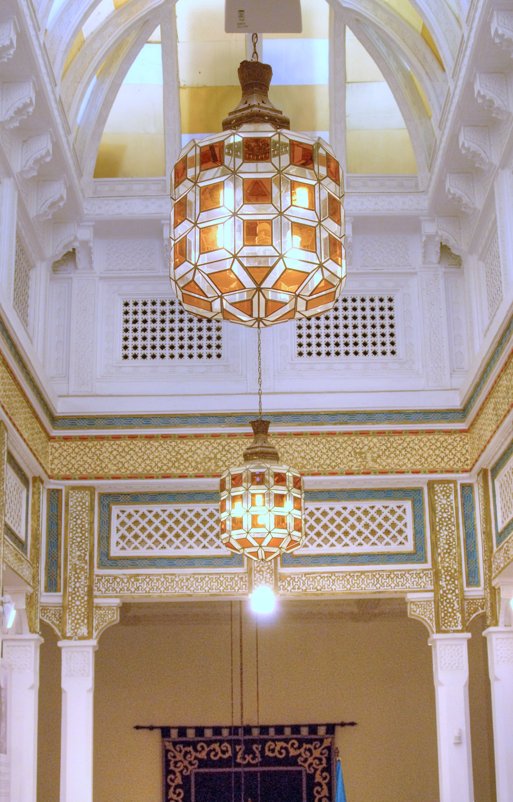 Fotografías que hay que disfrutar a su resolución, basta darle al circulito con el +, y comparar el tamaño grande con el original.